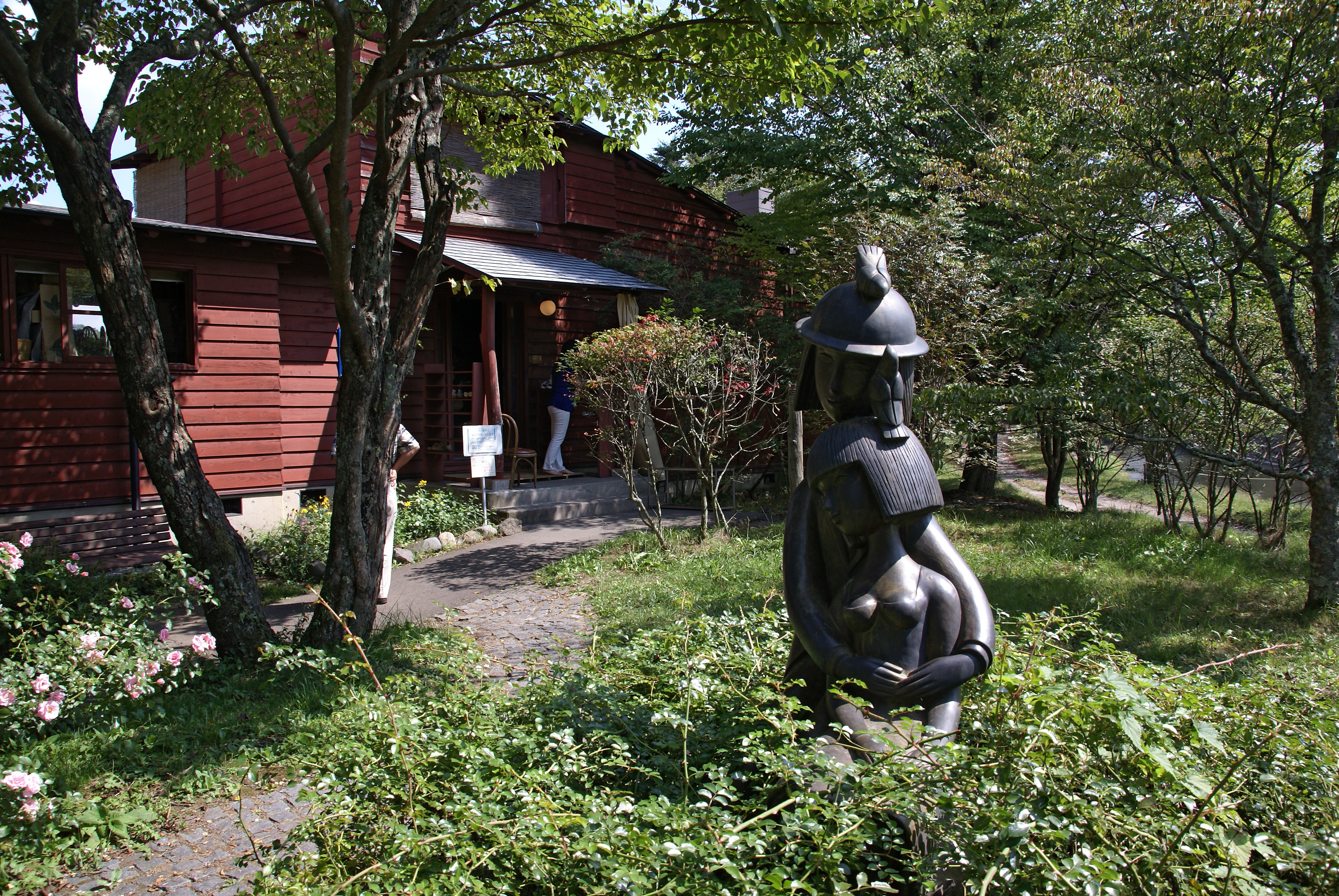 Peynet Museum in Karuizawa, Nagano, Japan